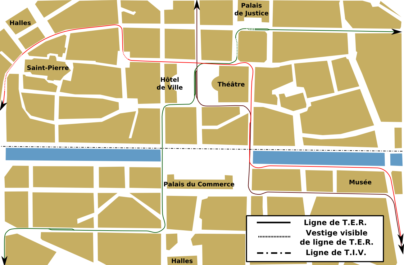 Carte du centre ville de Rennes.